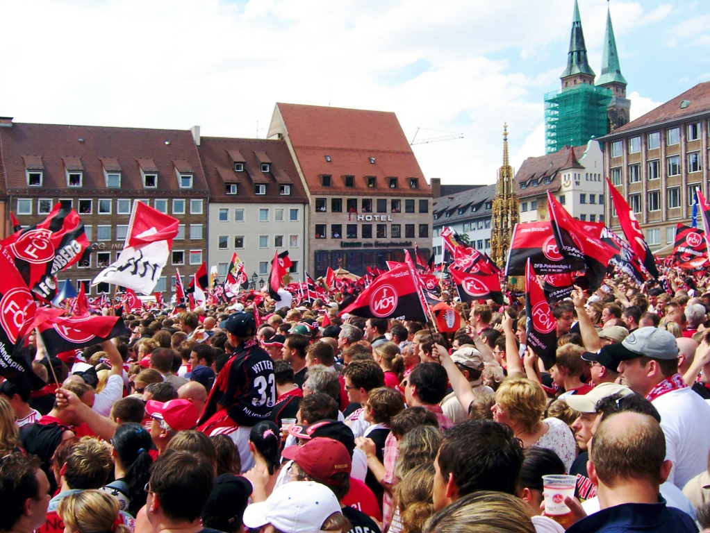 Siegesfeier des 1. FC Nürnberg nach dem Gewinn des DFB-Pokals 2017 am Hauptmarkt in Nürnberg